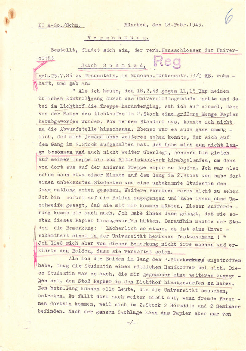 Protokoll der Vernehmung des Jakob Schmid vom 18.02.1943, Vorderseite